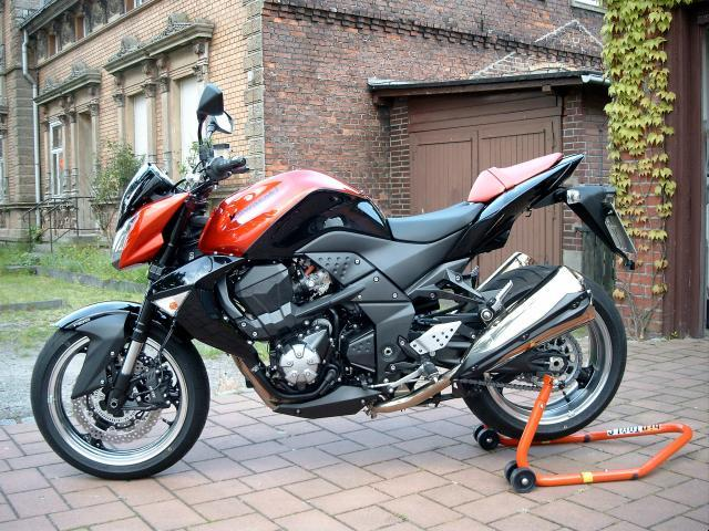 Kawasaki Z1000